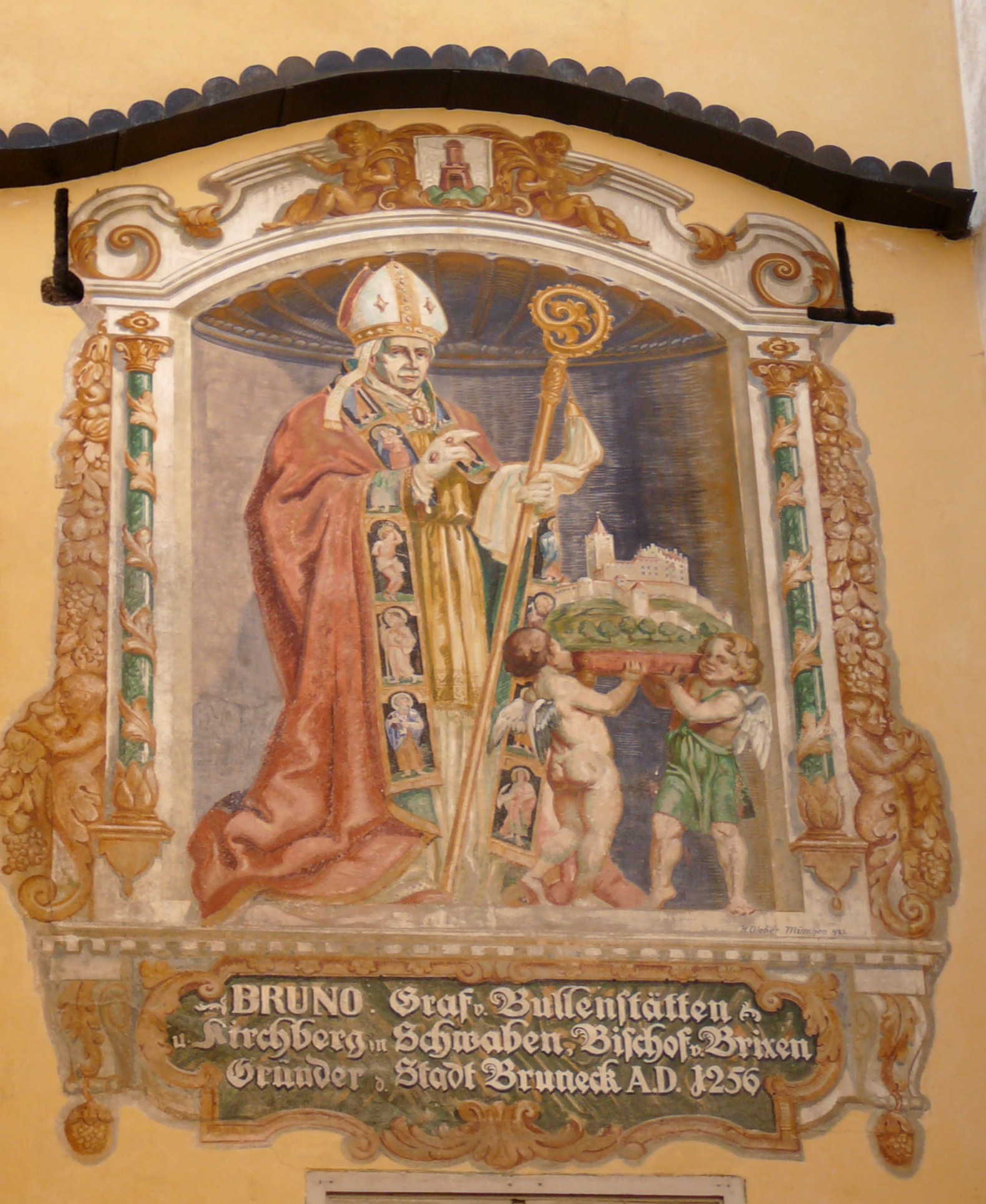 Vescovo Bruno von Kirchberg